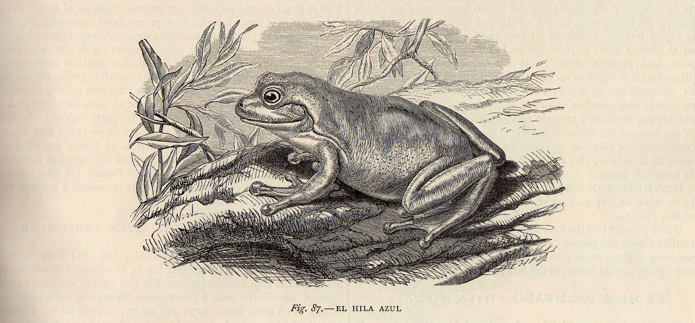 Hila azul, batracio de la familia Hylidae, que habita en Nueva Guinea y es común en Australia, cuyos aborígenes le dieron el nombre de rana azul por el color de su piel.